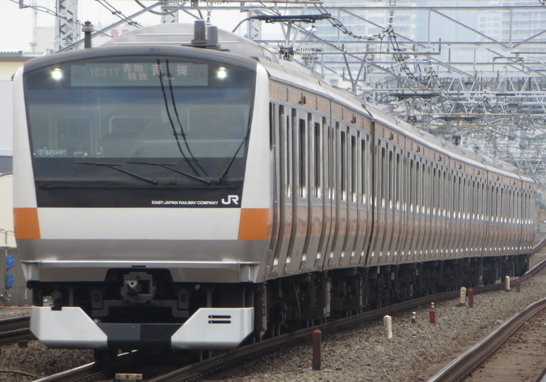 JR東日本E233系0番台トタT10 中央線高円寺